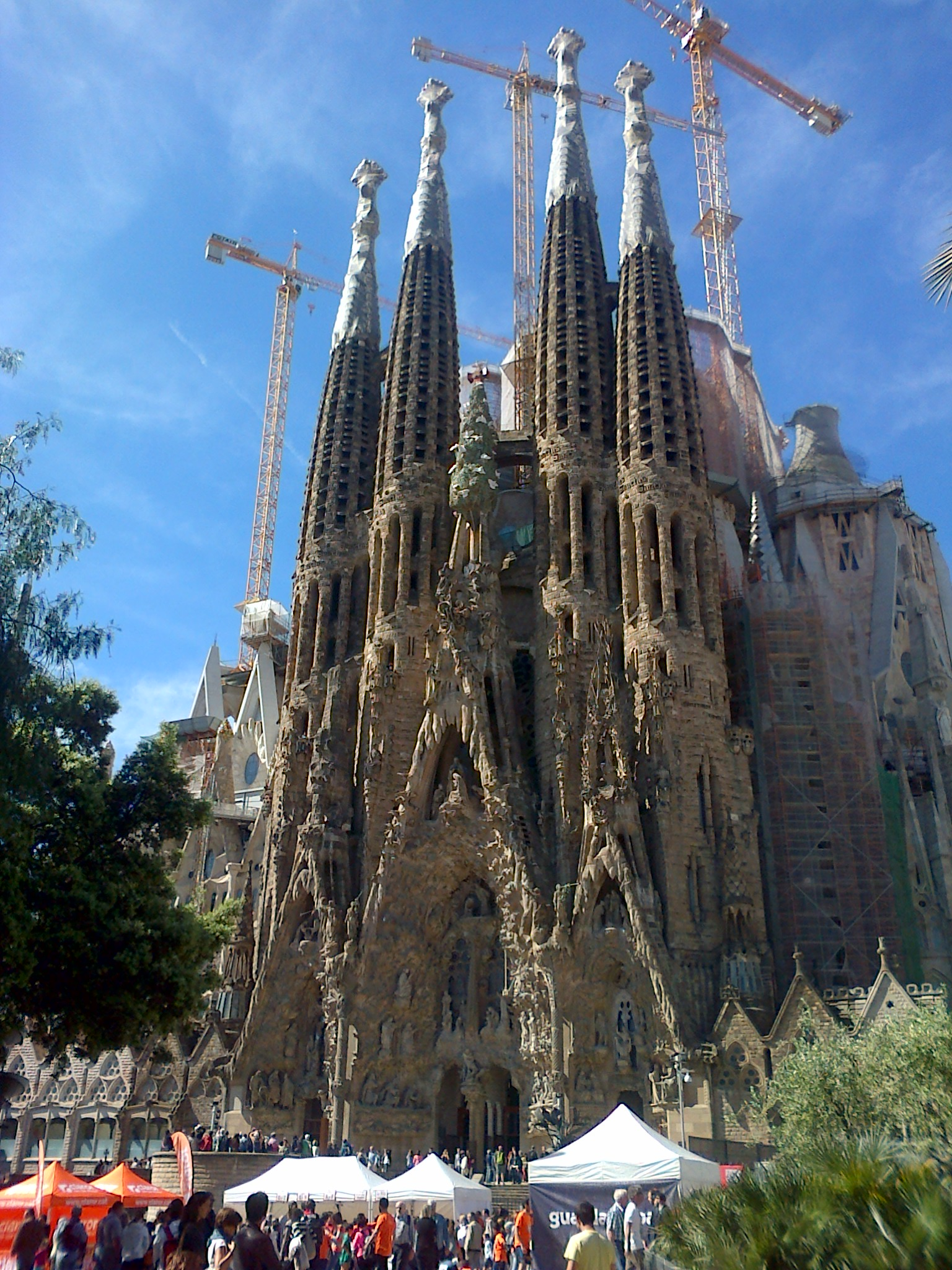 La Sagrada Familia, entorn a on es desenvolupa la Milla, cursa de mig fons